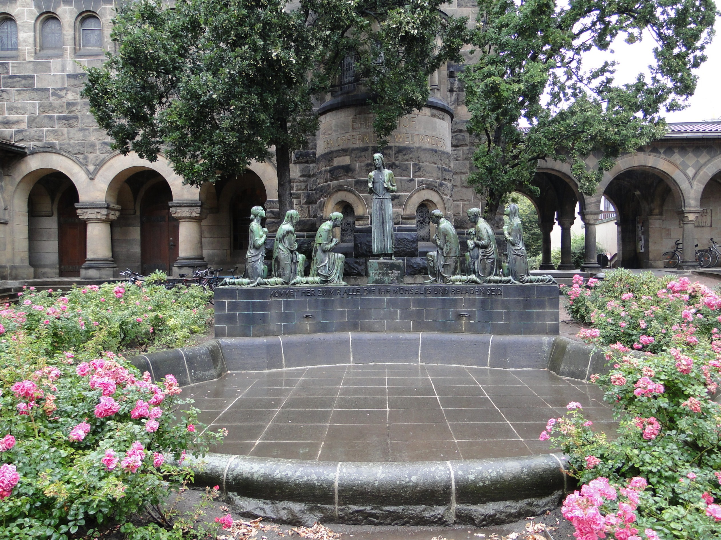 Ehrenbrunnen von Selmar Werner vor der Versöhnungskirche in Dresden